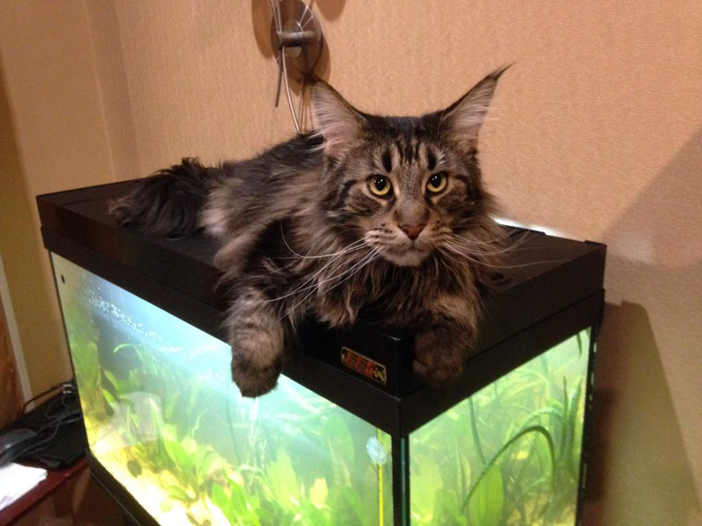 Мейн-кун Элвис